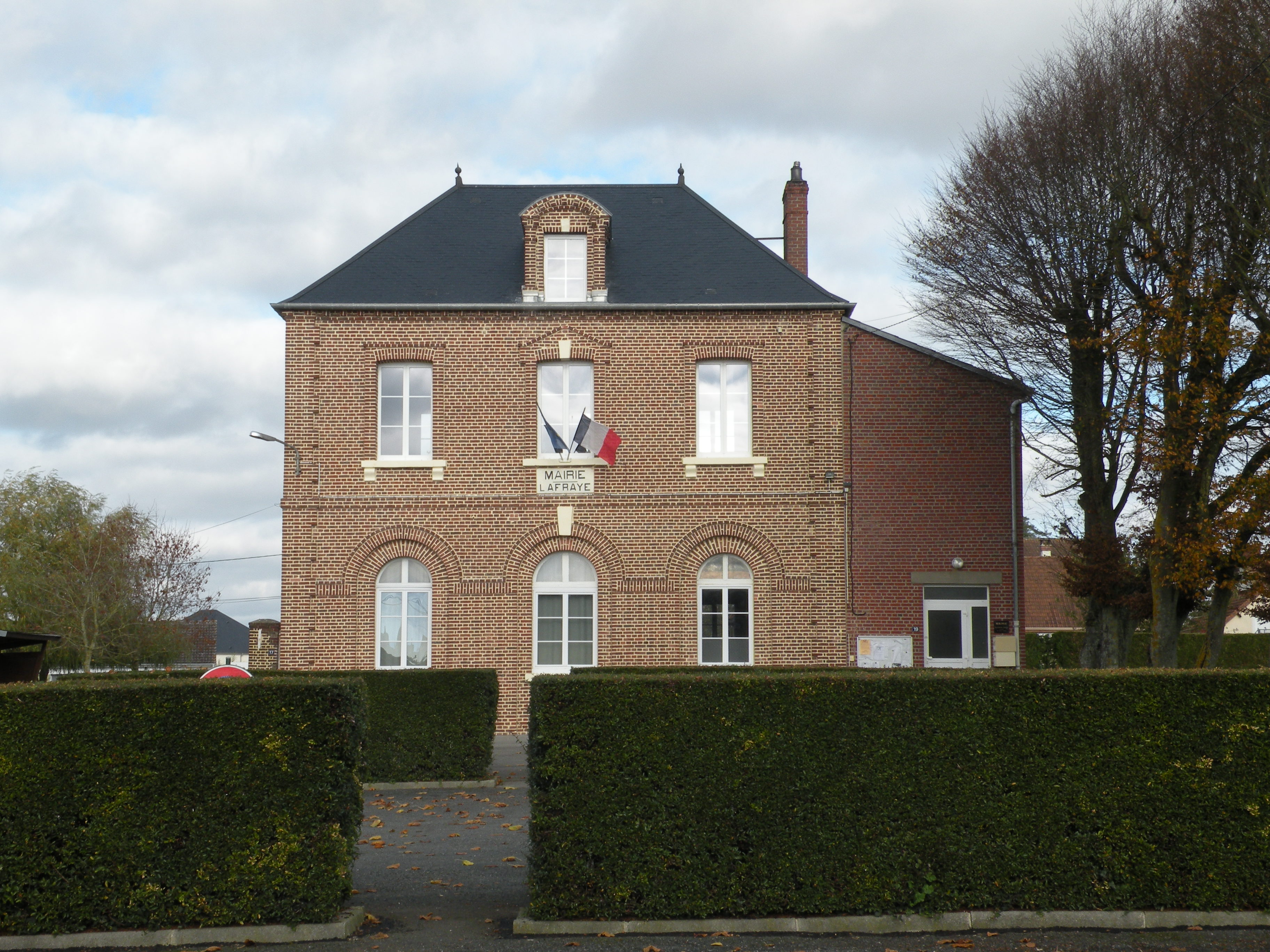 Lafraye